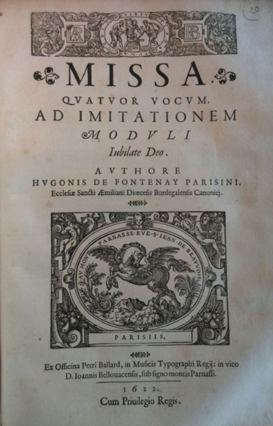 Title page of Hugues de Fontenay's Missa Jubilate Deo (Paris : 1662)